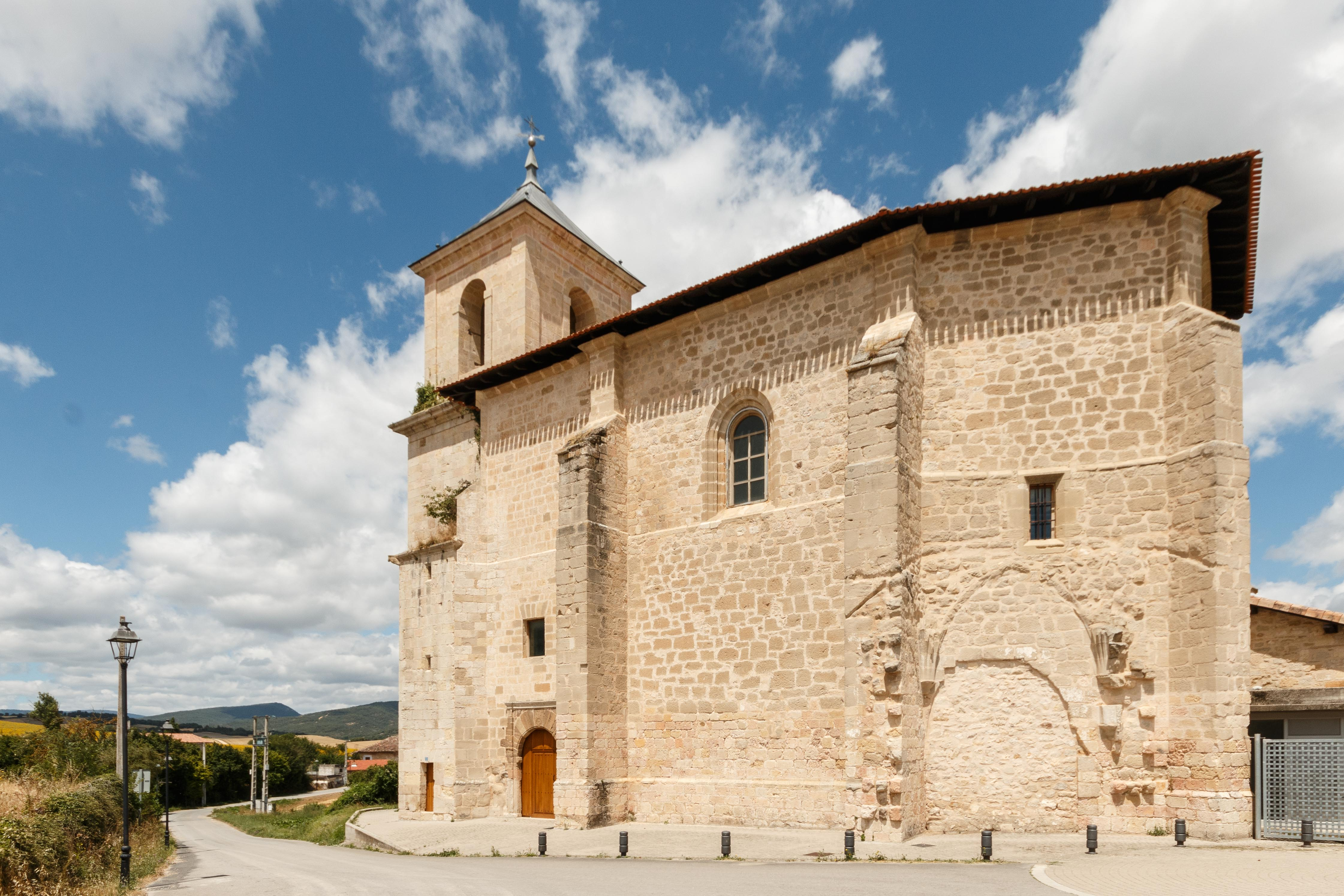 Andre Mariaren Jasokundearen eliza